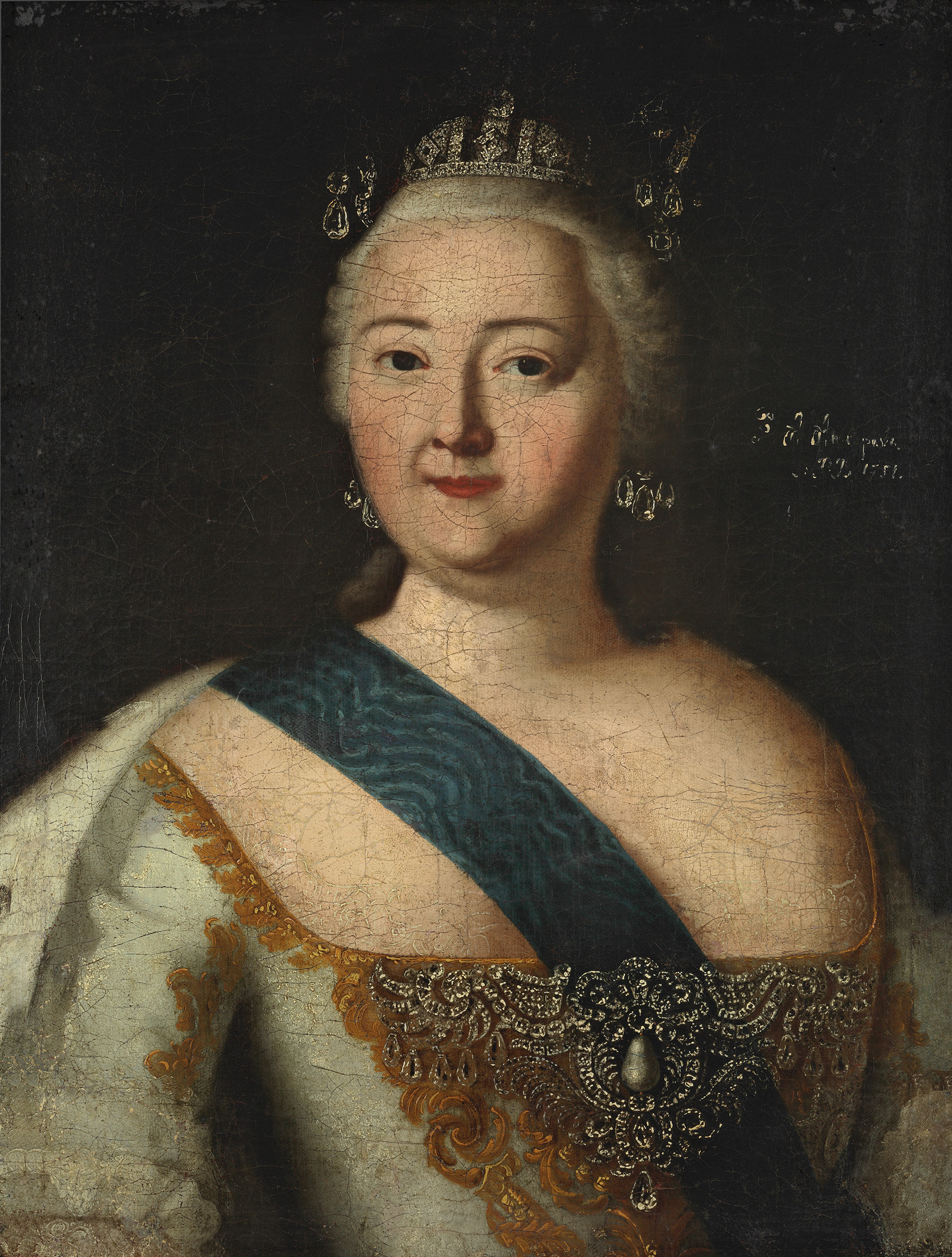 Портрет императрицы Елизаветы Петровны . (1751 , ГТГ). Это произведение является авторским повторением портрета , написанного А.П. Антроповым - тогда еще молодым художником, между 1744 и 1751 годами и находящегося в настоящее время в Сергиево-Посадском музее-заповеднике. Портрет написан под сильным влиянием учителя Антропова , французского художника Луи Каравака, приехавшего в Россию еще при Петре I и занявшего должность придворного живописца при императрицах Анне Иоанновне и Елизавете Петровне . Не имеющий еще достаточной практики в написании портретов , художник допускает некоторые погрешности в исполнении фигуры императрицы, которая отличается некоторой скованностью, в лице, на которое живописец кладет чересчур резкую светотень. Особенно важны при написании императорского портрета детали, указывающие на высокое положение модели. Поэтому особо старательно художник выписывает детали парадного одеяния Елизаветы Петровны: голубую муаровую ленту ордена Святого Андрея Первозванного и узорочье платья, малую императорскую корону, бриллиантовые серьги и эгрет в прическе, аграф с крупной жемчужиной – драгоценное украшение на лифе платья. Рядом с парадными портретами императрицы работы блестящих русских и иностранных мастеров - Л.Каравака, И.Я.Вишнякова и Л.Токе, а также отличающимися особым изяществом изображениями кисти Г.Х.Гроота и П.Ротари, антроповское произведение занимает достаточно скромное место. Справа вверху на фоне подпись: P. A. Antropove. S: P. B. 1751. Приобретена в 1924 г. у Д. Девинова. Произведение записано в инвентарной книге Государственной Третьяковской галереи под номером 4559.